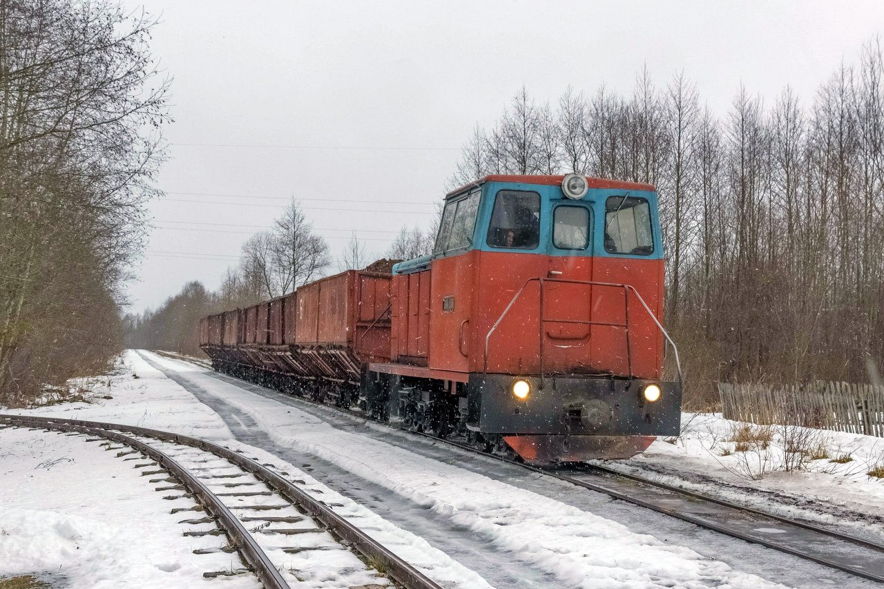 Pociąg z torfem na Tiosowskiej kolejce wąskotorowej